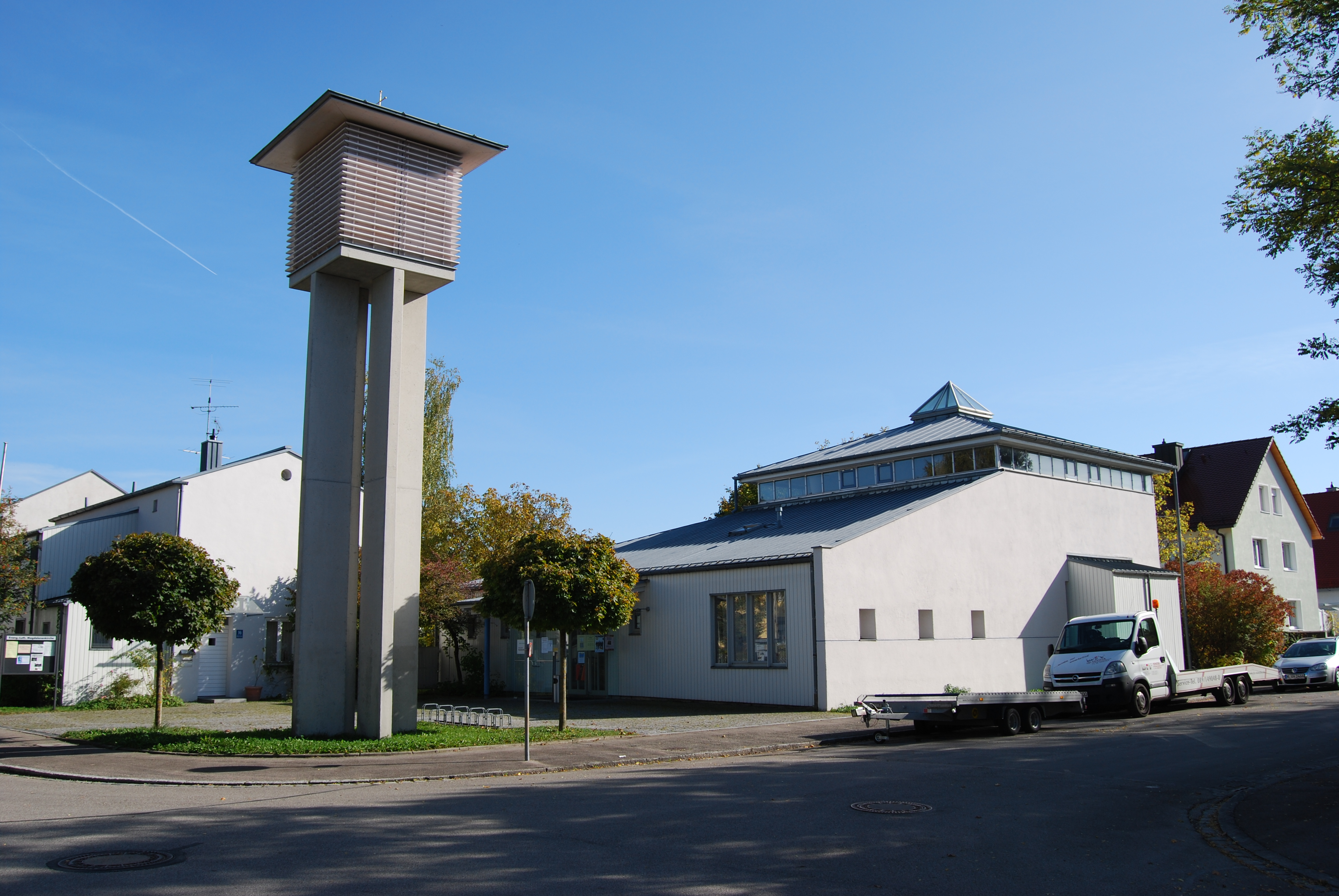 ev. Magdalenenkirche in München-Moosach, Ohlauer Straße